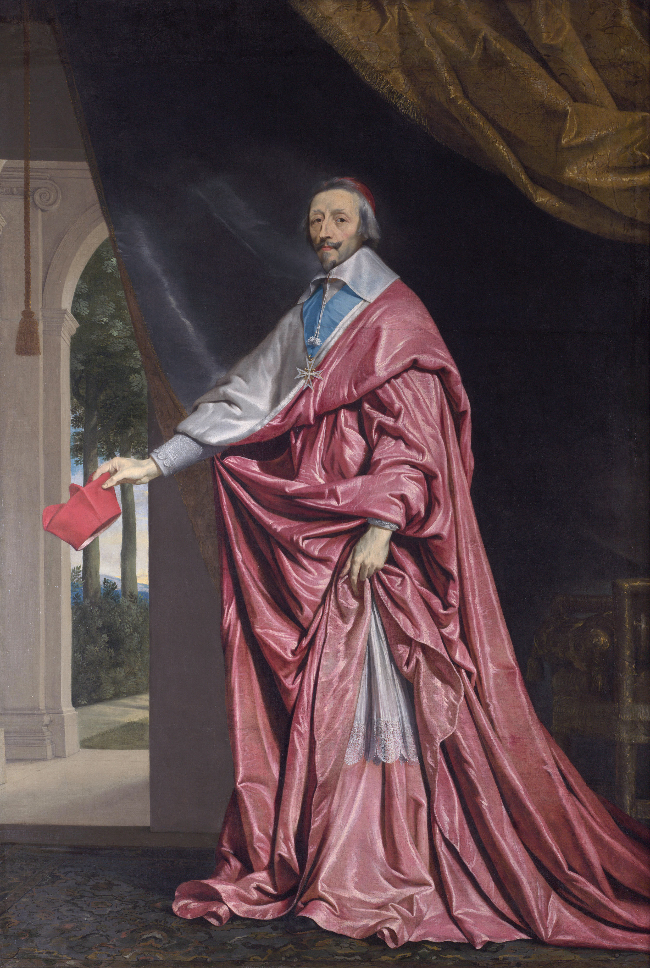 Der Kardinal in Ganzfigur mit dem Kardinalhut in der Rechten - ein Attribut seiner Kirchenmacht und Größe.